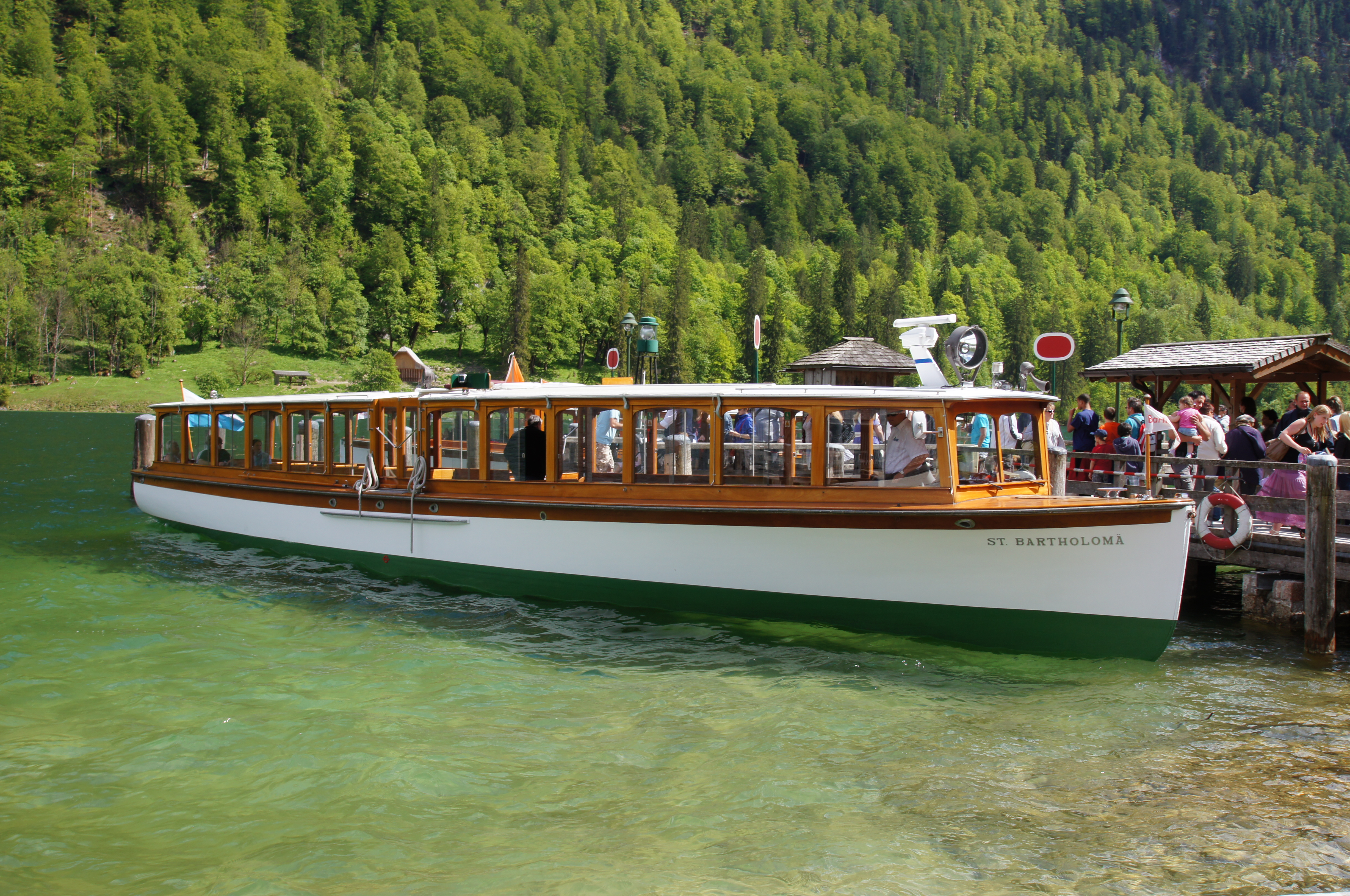 Königssee: Das Schiff St. Bartholomä.